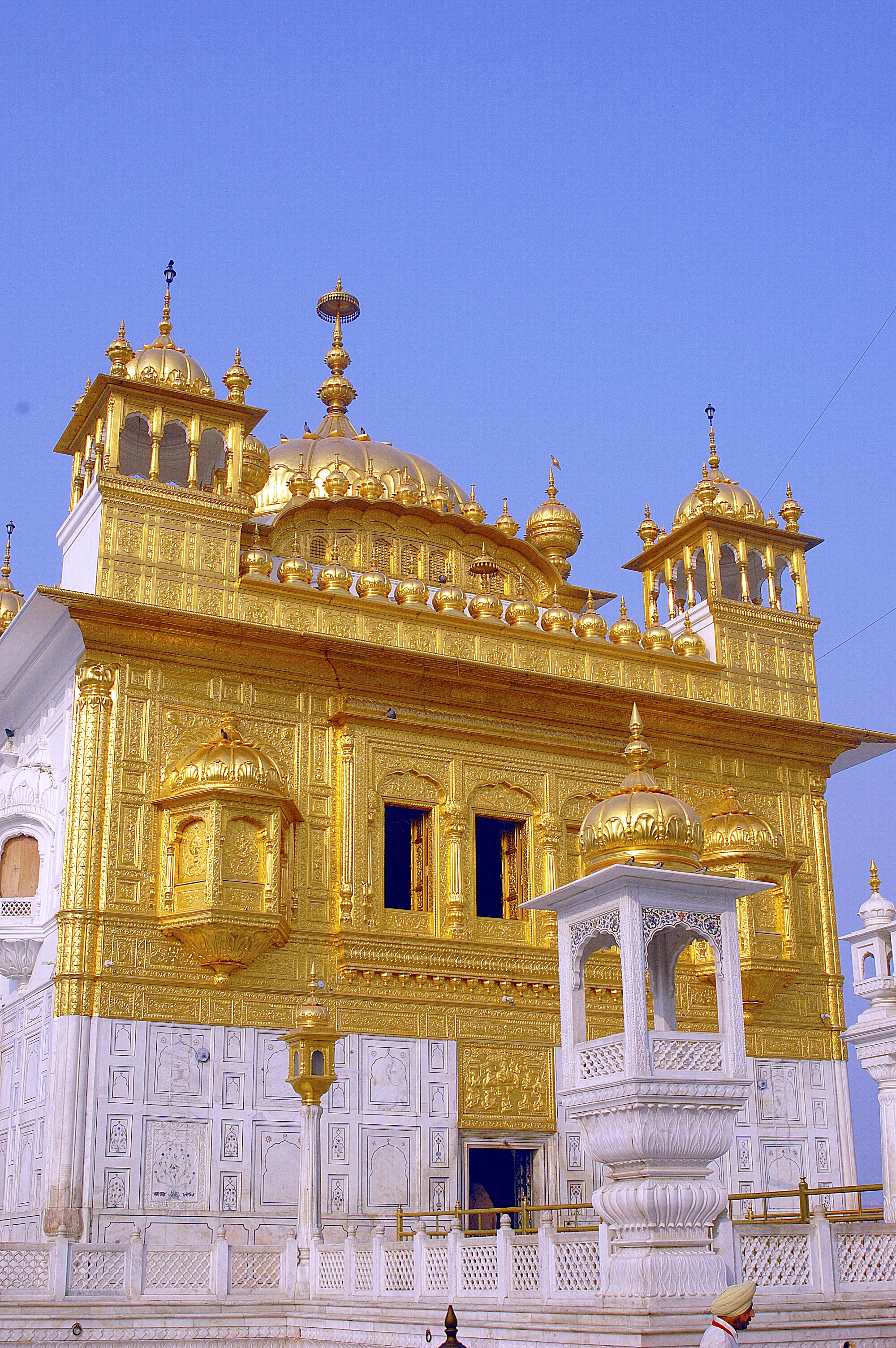 Gurudwara Tarn Taran Sahib, Punjab, India.